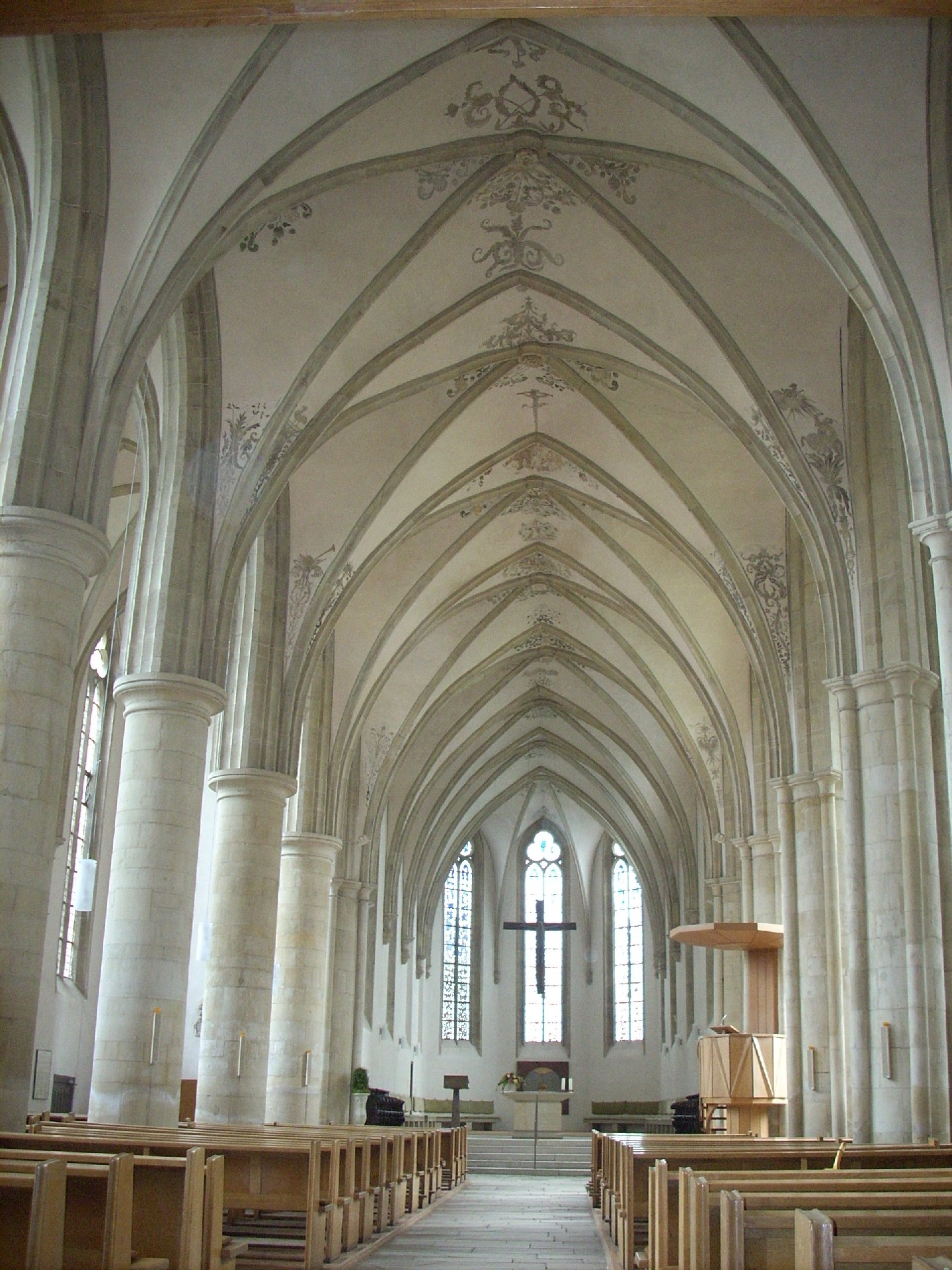 Ev. Apostelkirche Münster, Mittelschiff